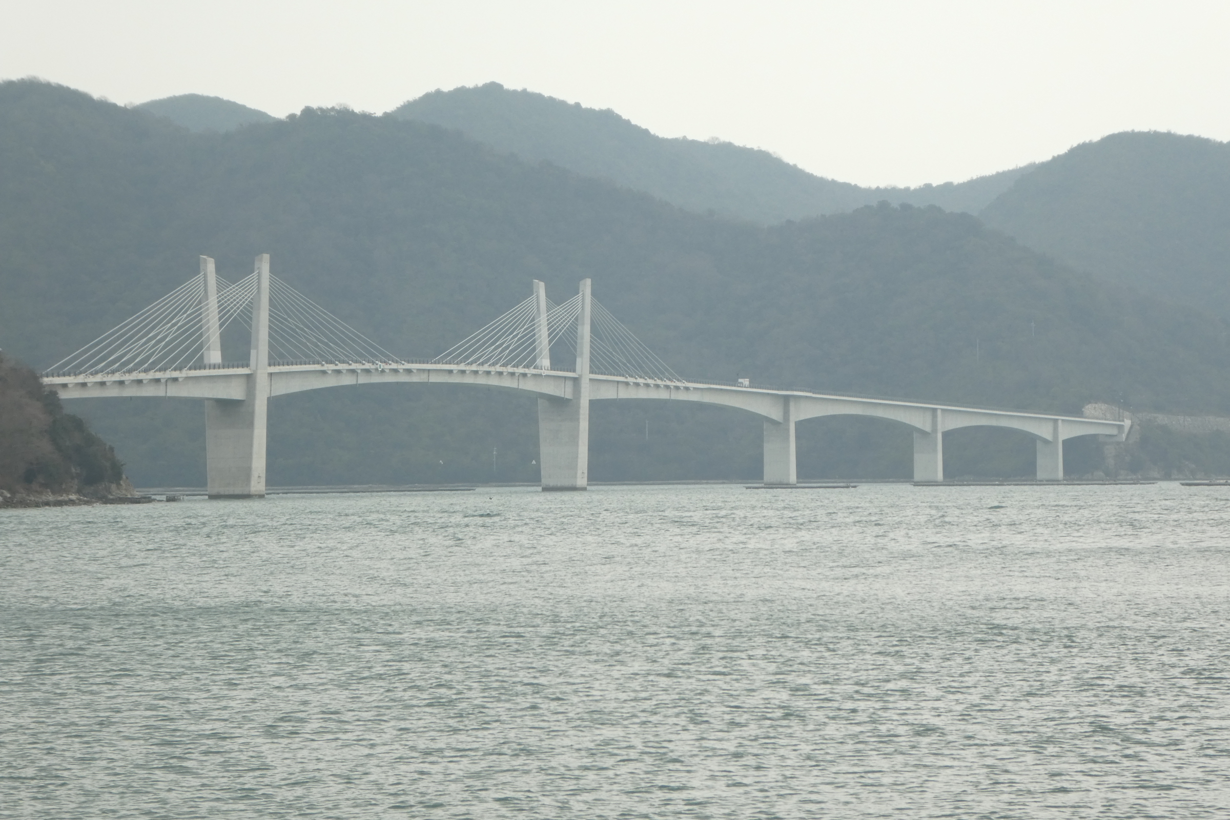 備前♡日生大橋